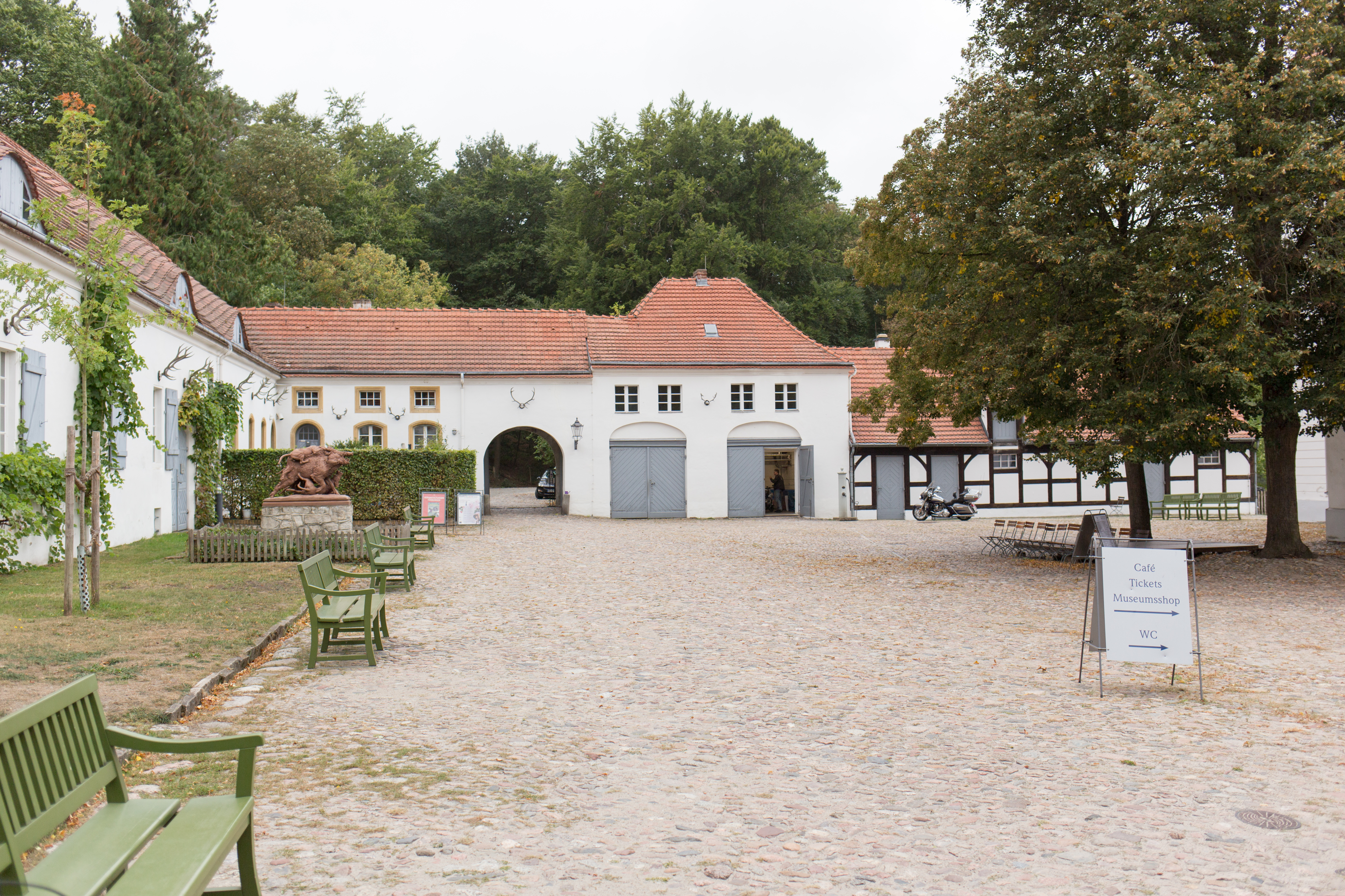 GLAM-on-Tour: Jagdschloss Grunewald Wikipedianer fotografierten am 21., 22. und 23. September 2018 im Jagdschloss Grunewald. This photo was taken during a project supported by WMDE. Gefördert von / Supported by: Wikimedia Deutschland, Stiftung Preußische Schlösser und Gärten Westliche einfahrt in den Innenhof.